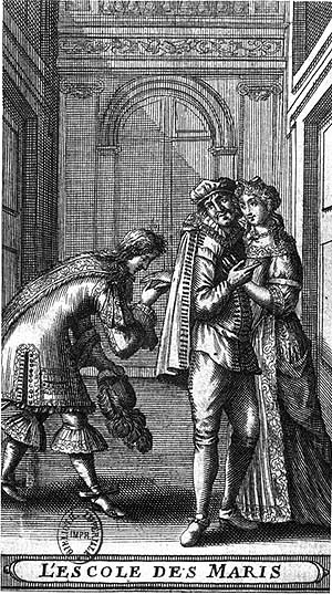 Frontispice de l'édition de 1662